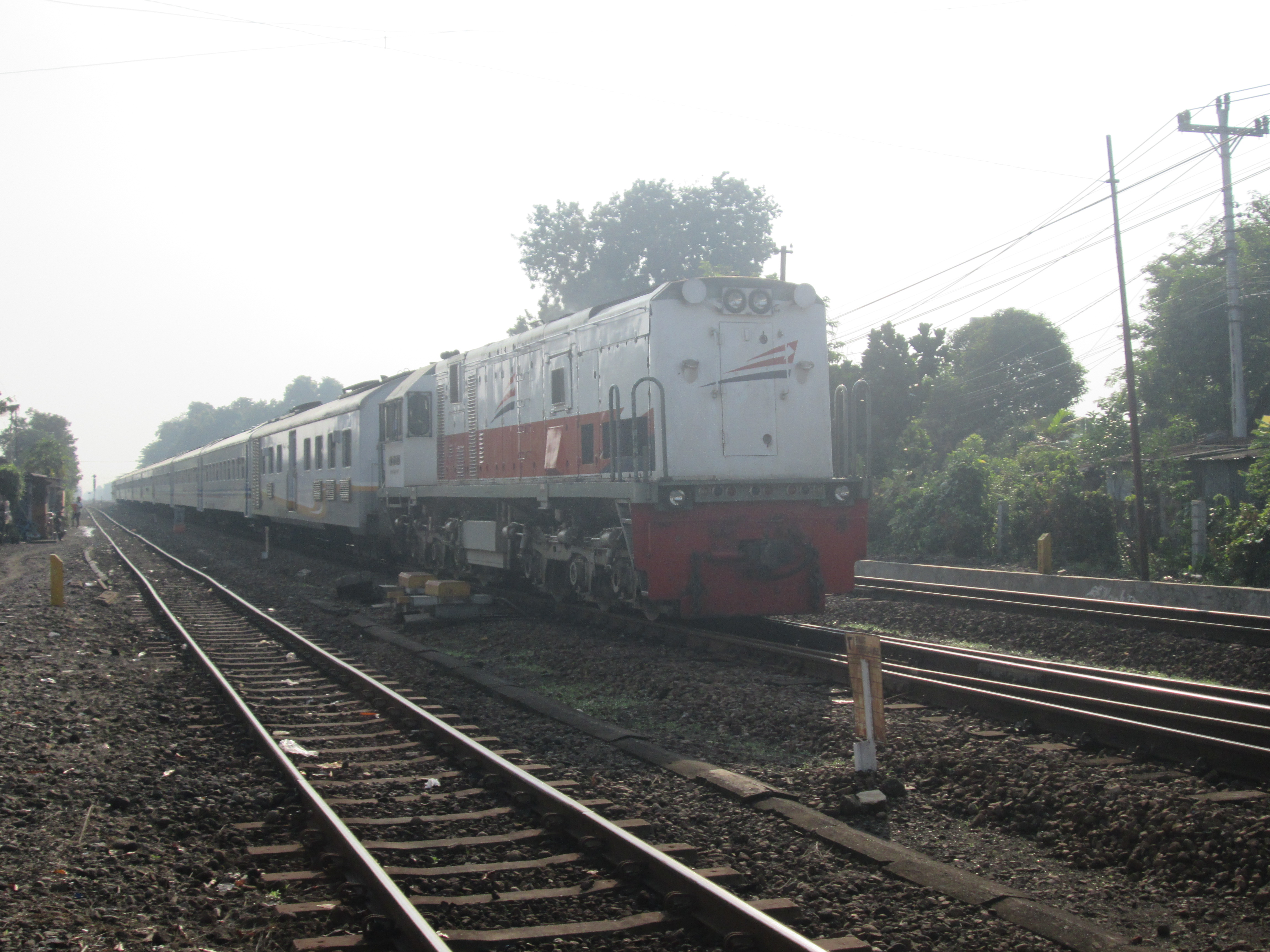 Kereta api Joglokerto akan memasuki stasiun Lempuyangan.